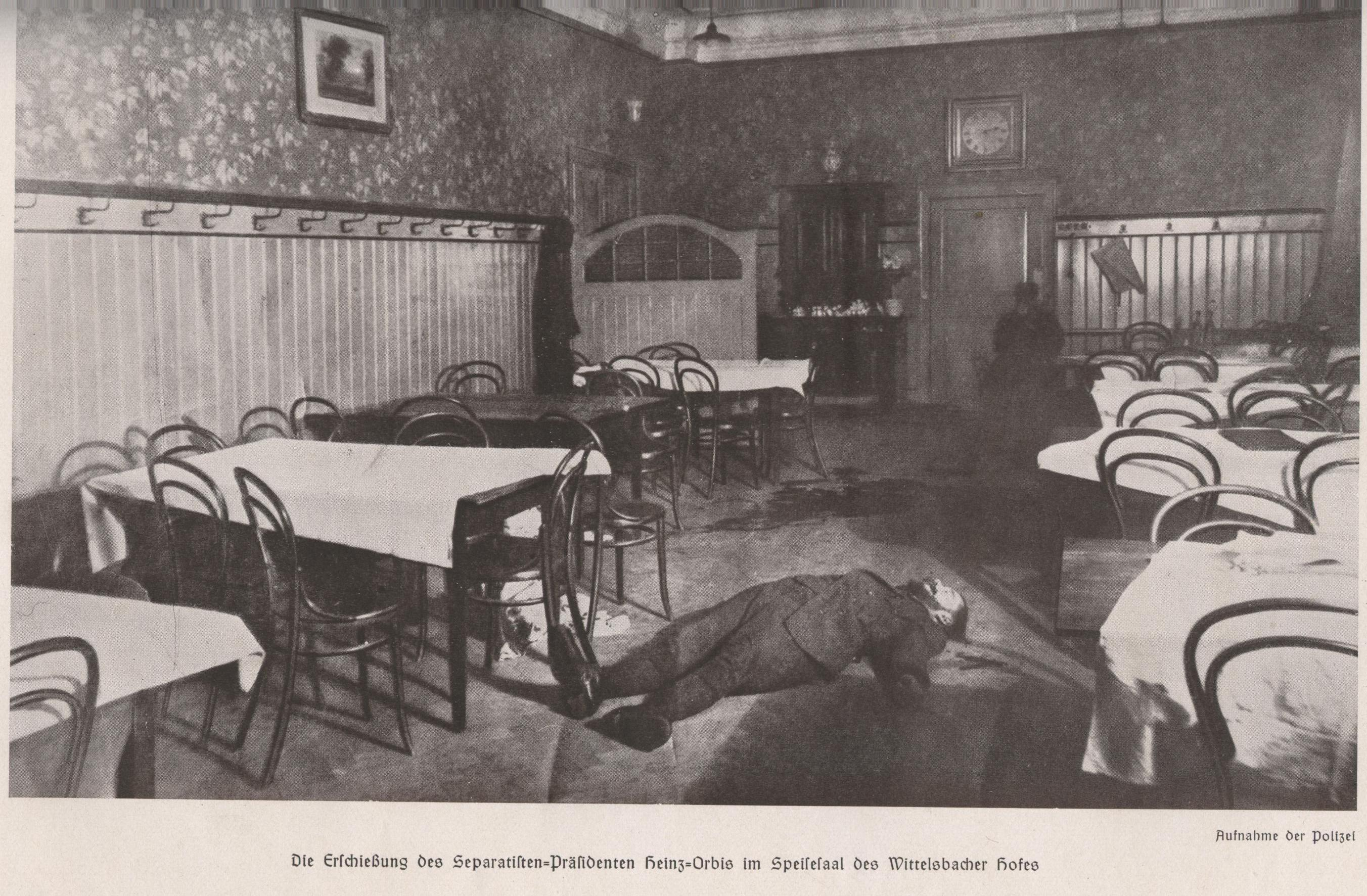 Separatisten-Präsident Franz Josef Heinz, genannt Heinz Orbis, erschossen in Speyer, 9.1.1924